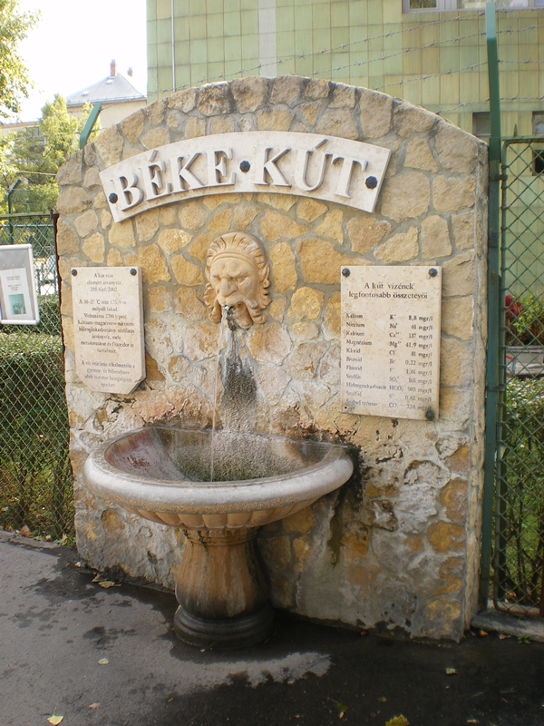 Béke-kút a budapesti Dagály fürdőnél (XIII. kerület, Népfürdő u 30, A strand bejárata előtt bal oldalt). Terméskőből kirakott támfalon mészkő vízköpő. Ásványi tartalmú (ingyenes) víz. Kétoldalt az összetételt jelző tábla.